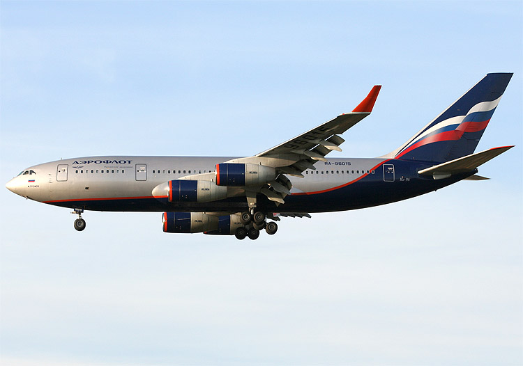 Ноябрь 2006, Шереметьево